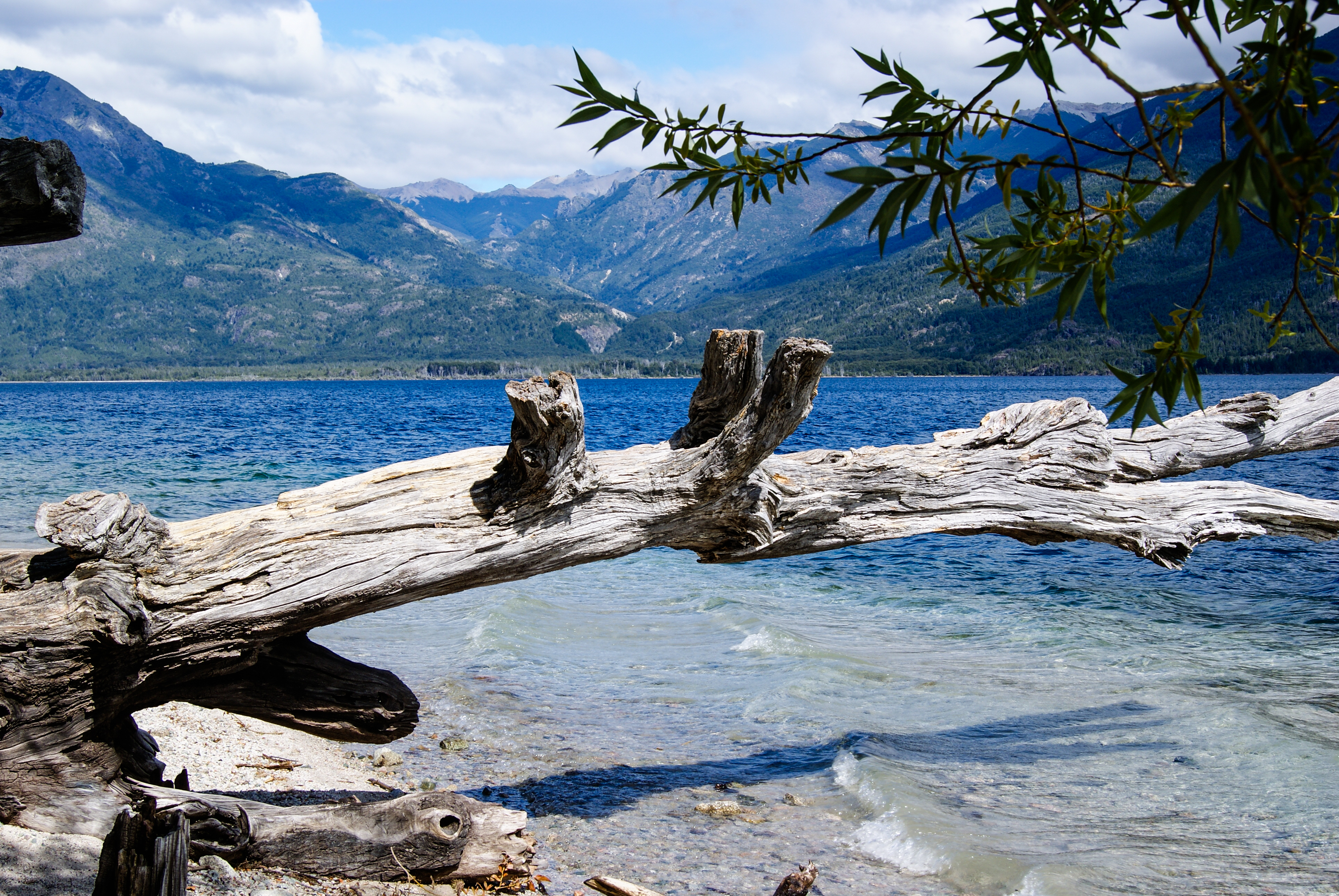 Vista del lago en Epuyén - Puerto Patriada